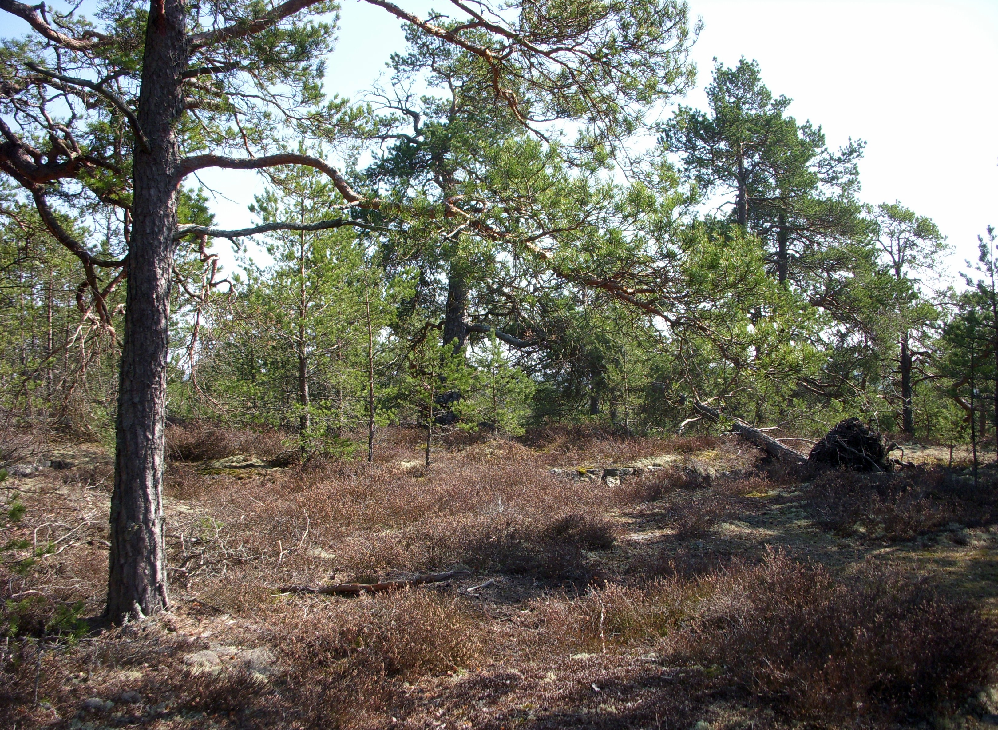 Korpbergets naturbarrskog (Huddinge kommun)